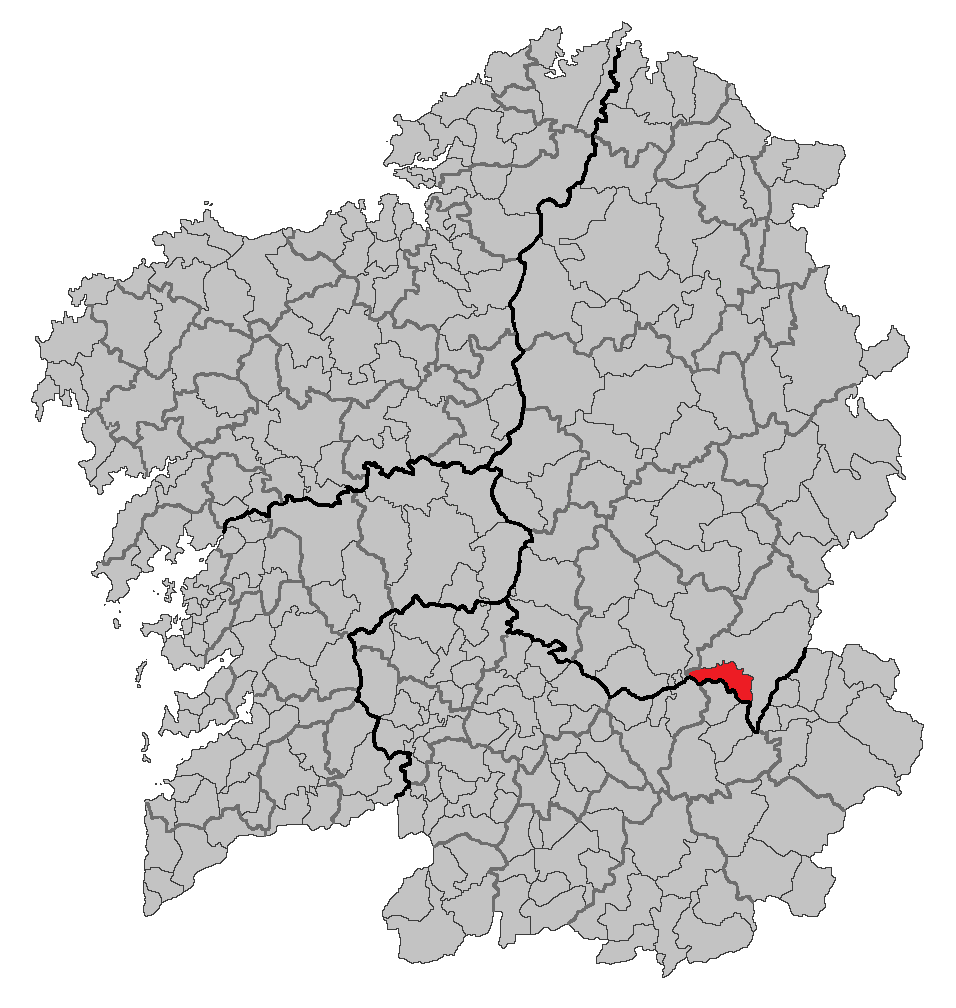 Mapa coa localización do concello de Ribas de Sil.